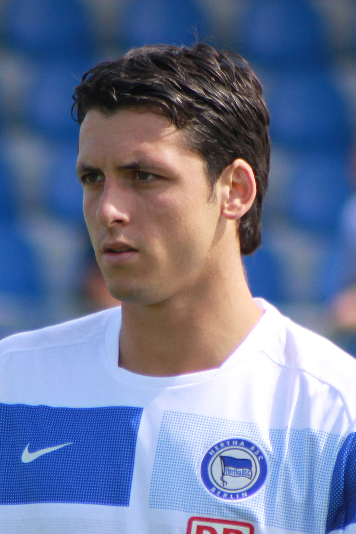 Gojko Kačar – Hertha BSC Berlin (1)